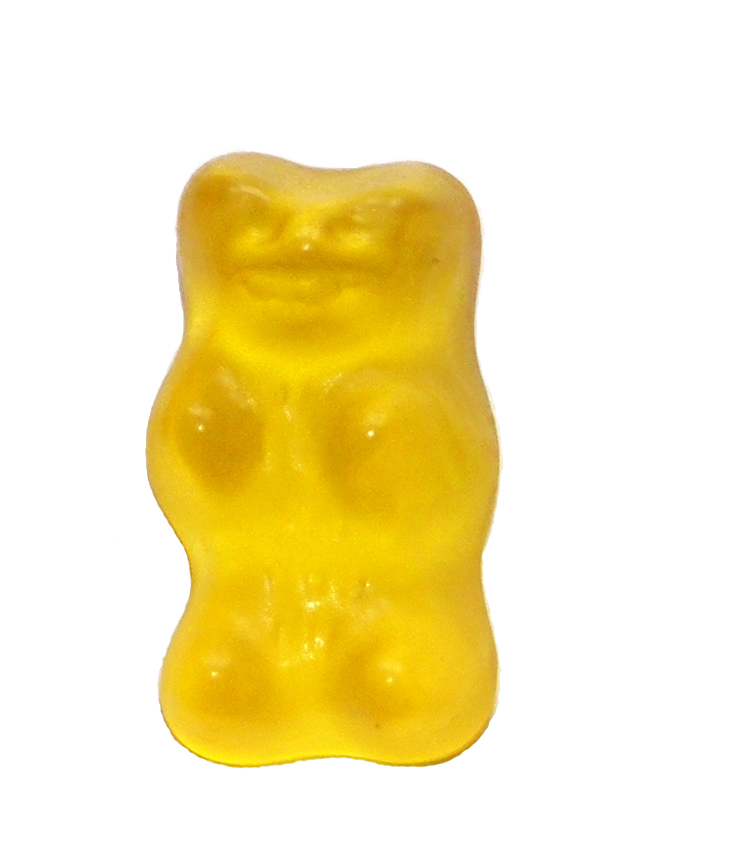 Gummibärchen